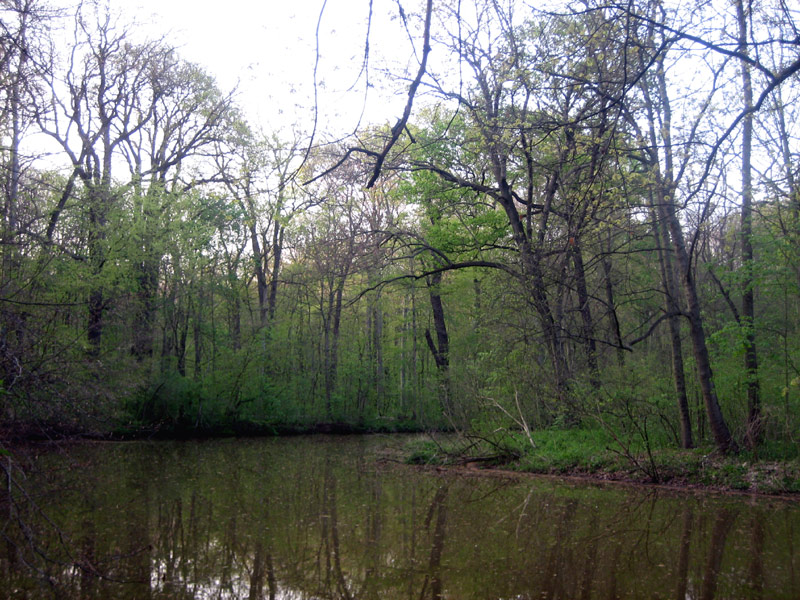 Pleiße im Leipziger Auwald